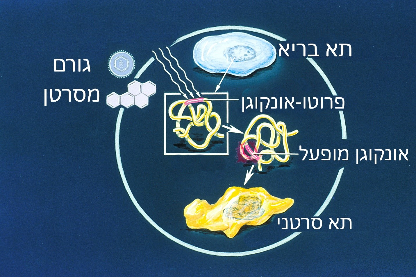 המסלול בו תא בריא מותמר לתא סרטני. גורם מסרטן יגרום למוטציה בפרוטו-אונקוגן, ויהפוך אותו לאונקוגן מופעל שמעודד חלוקה והתפתחות תא סרטני.